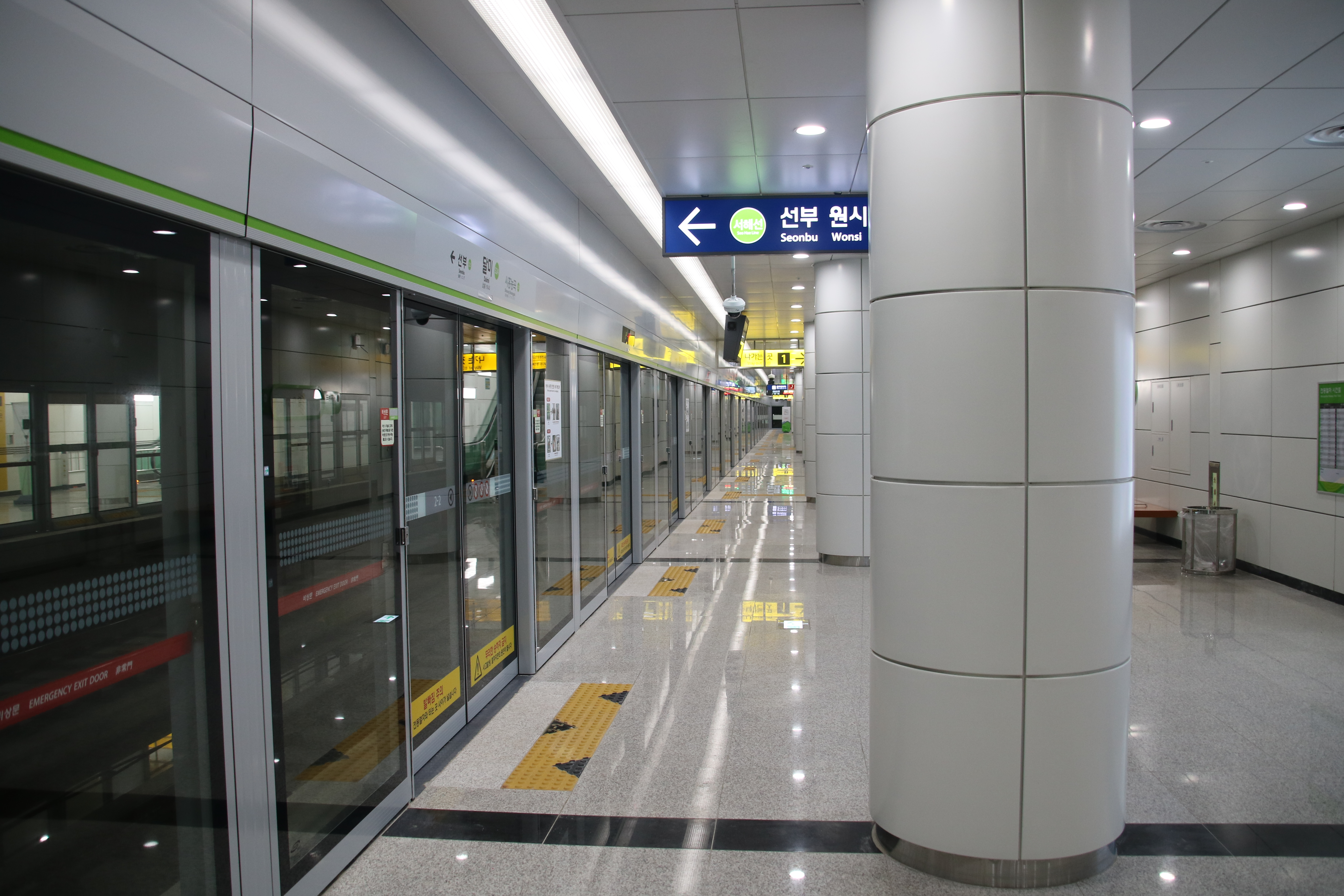 달미역 승강장 (원시방면)